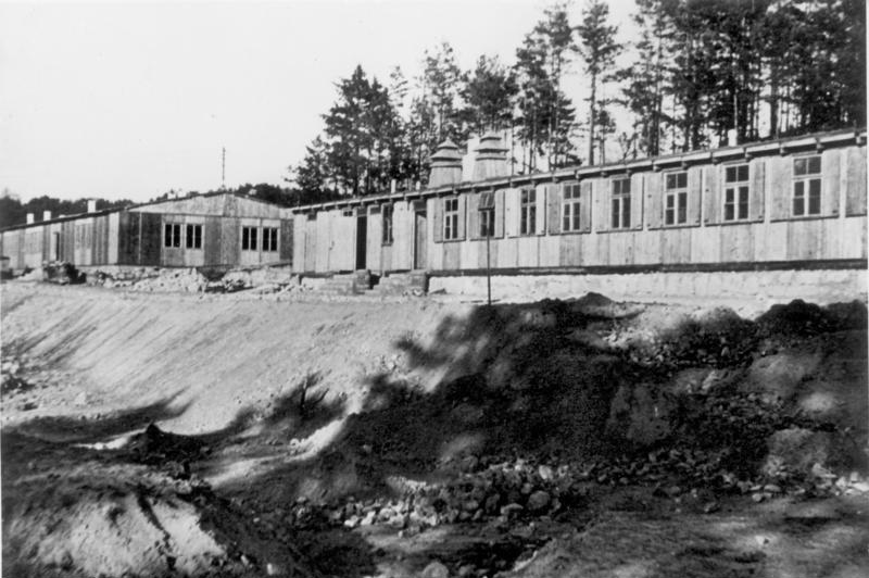 Die Karstschulungsstätte Pottenstein/Oberfranken Ein Bilderatlas mit Erläuterungen Zusammengestellt von SS-Standartenführer Dr. Brand. Ein Gebirgsbarackenlager für 1200 Mann, 400 Pferde und 100 Kraftfahrzeuge ermöglicht die Verwendung des Pottensteiner Karstes zur Spezialausbildung.- Der Exerzier- und Sportplatz dient der Grundausbildung und körperlichen Ertüchtigung. In unmittelbarer Nähe des Lagers liegen die Wasserübungsanlage, 3 Scharfschießbahnen, 1 ausgebautes Pionier-Stoßtrupp-Ausbildungsgelände, 5 Klettergärten, 6 Höhlen und 2 Schächte.